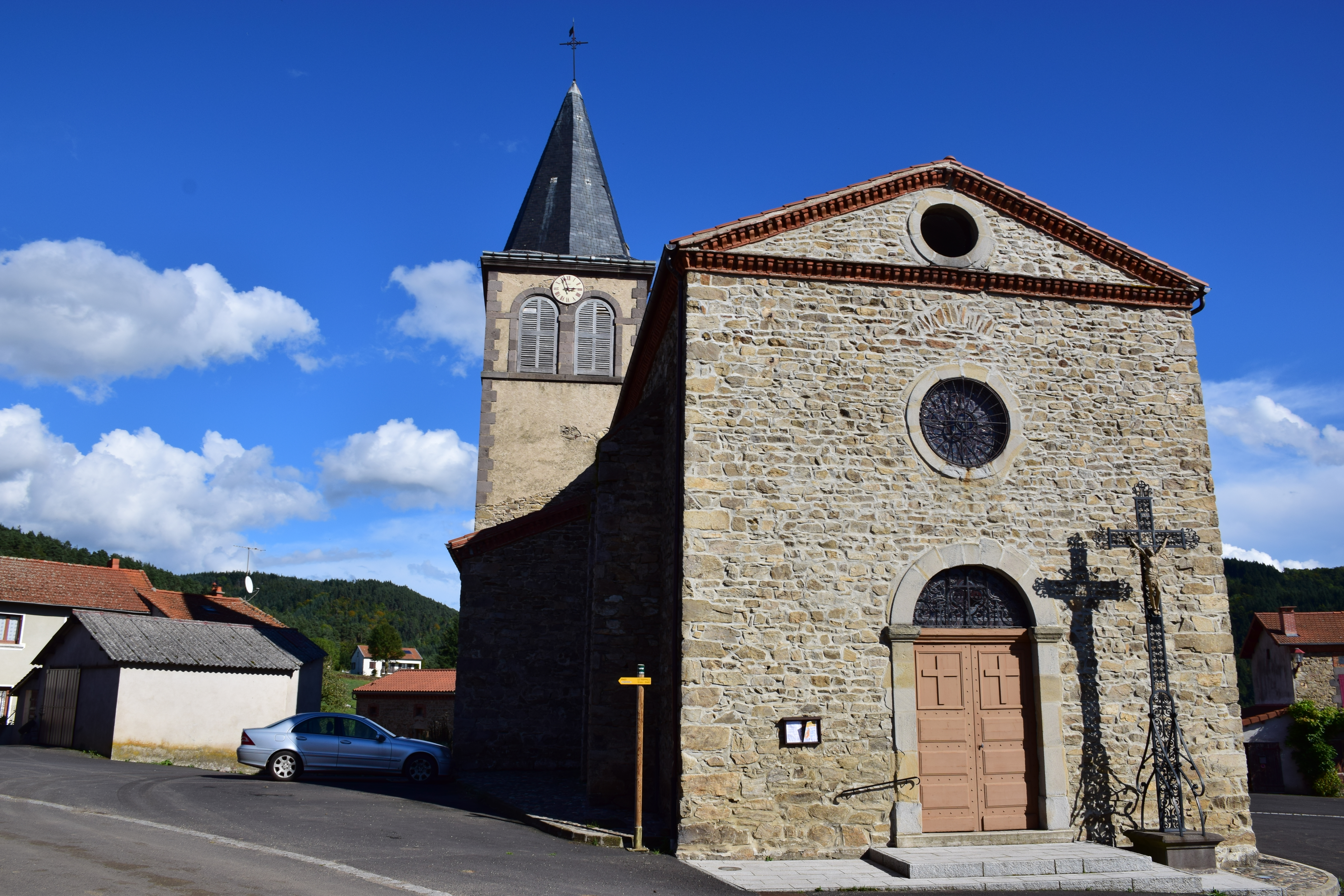 L'église de Chaniat (Haute-Loire, France).